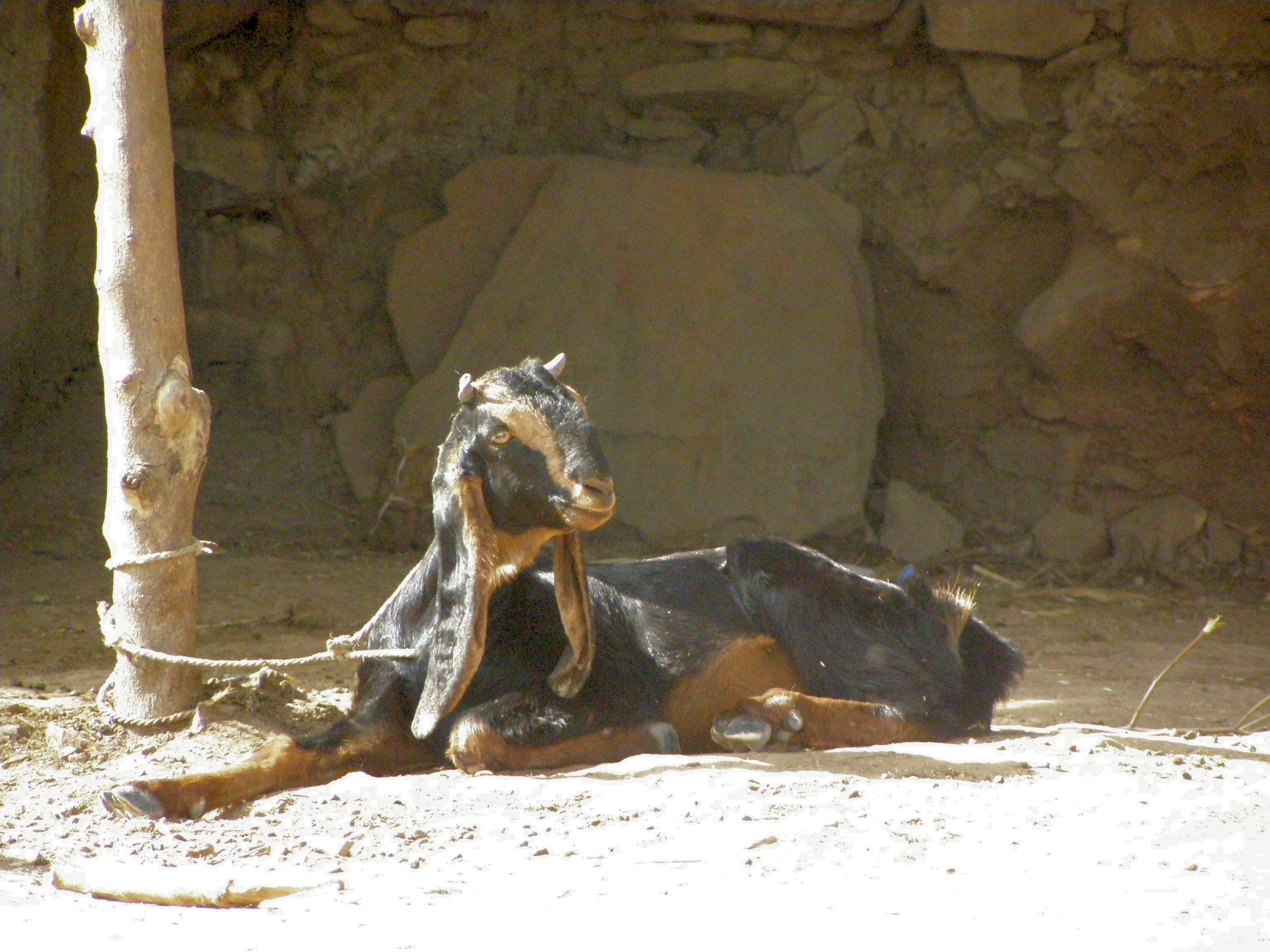 Chèvre de race Jamunapari aux longues oreilles et haute sur pattes originaire de l'Uttar Pradesh - Environs du Fort de Ramathra - District de Karauli - Rajasthan - Inde